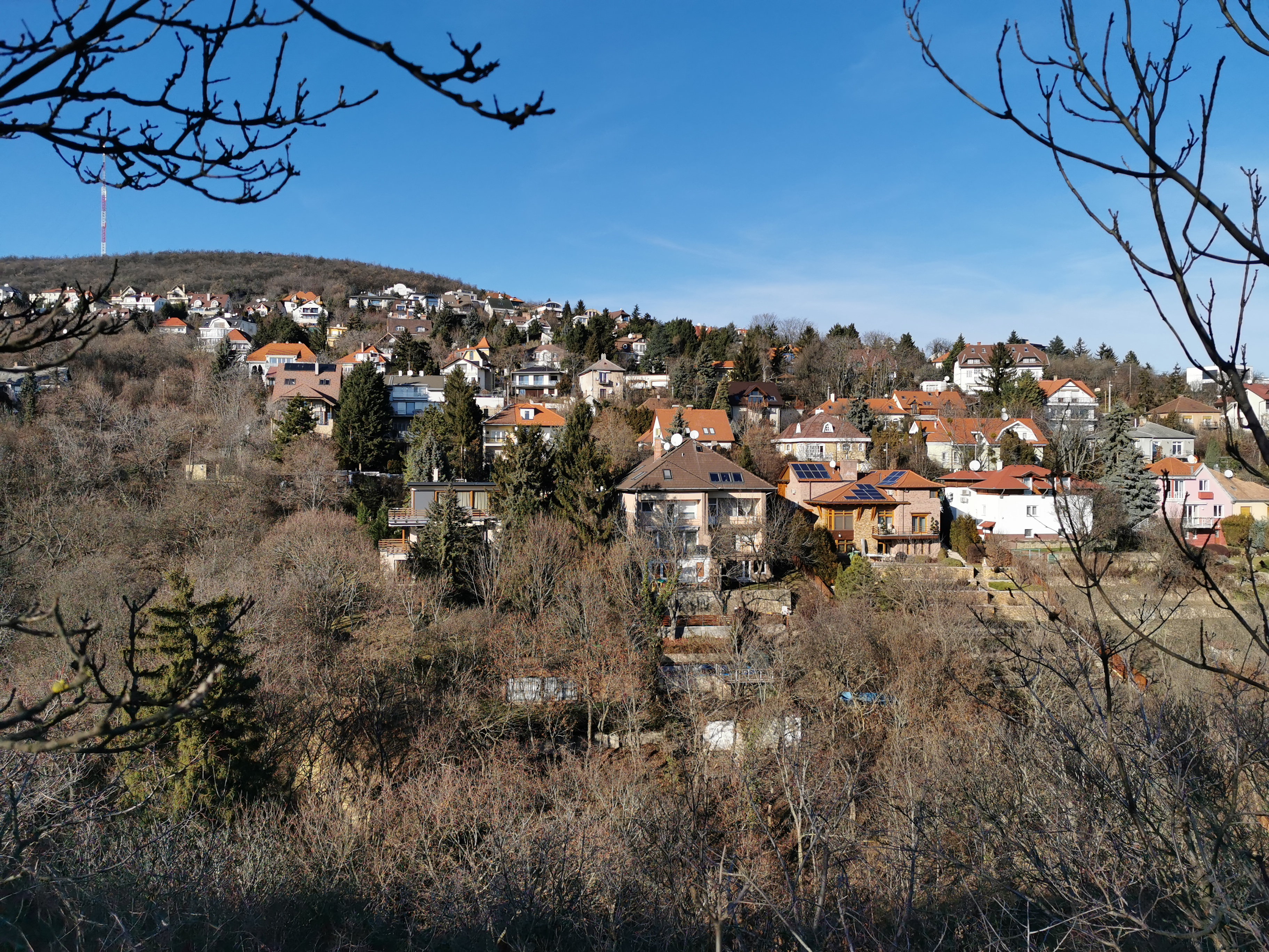 Farkas-völgy. 2020. február 1-én, szombaton, az Ördög-oromról fényképezve. Budapesten.